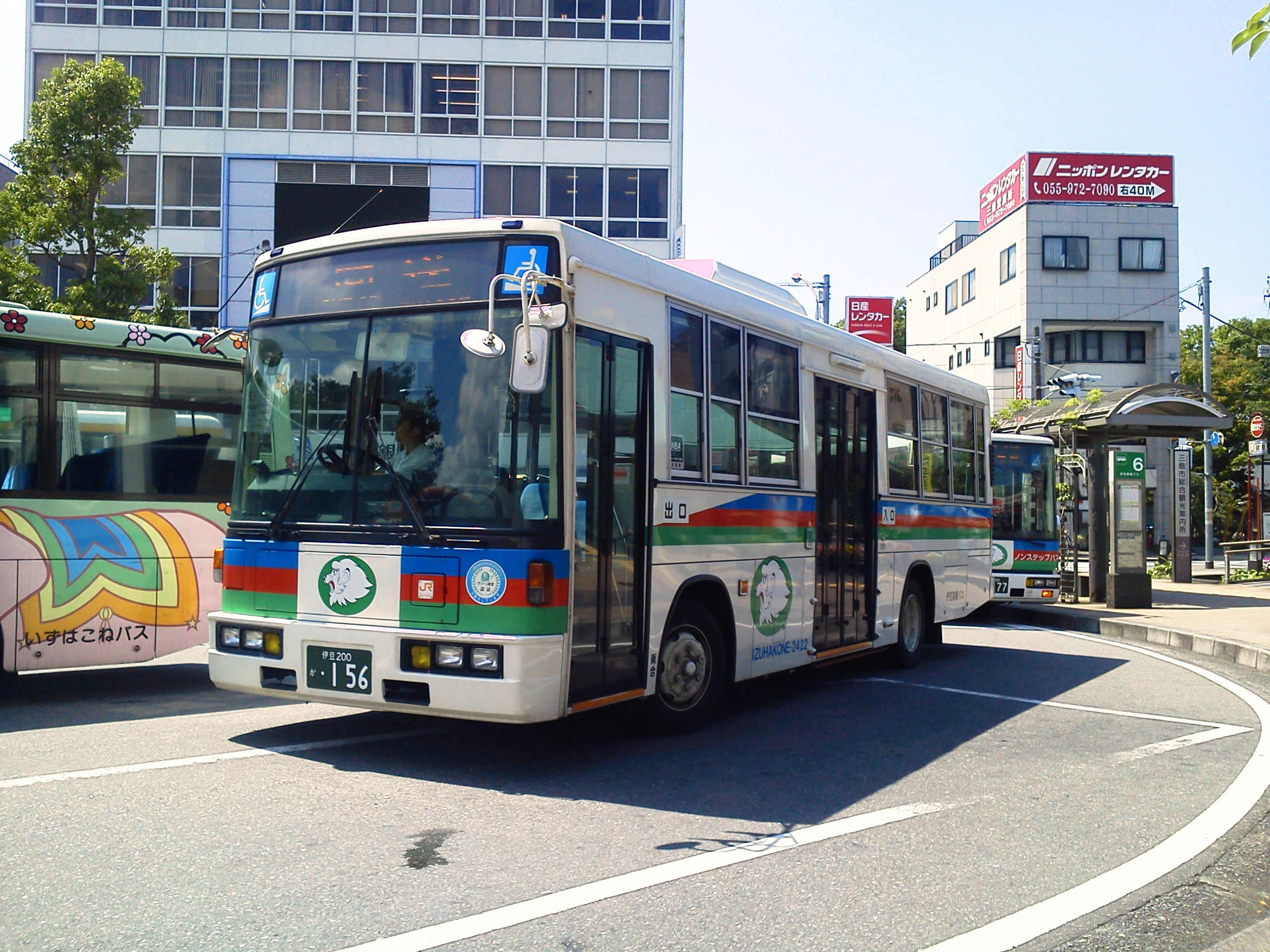 伊豆箱根バス 2422（三島営業所） 車種：日産ディーゼル スペースランナーRM（KC-RM211GSN） ※西武バス譲受車 ナンバー：伊豆200か156 撮影場所：三島駅南口バスターミナル